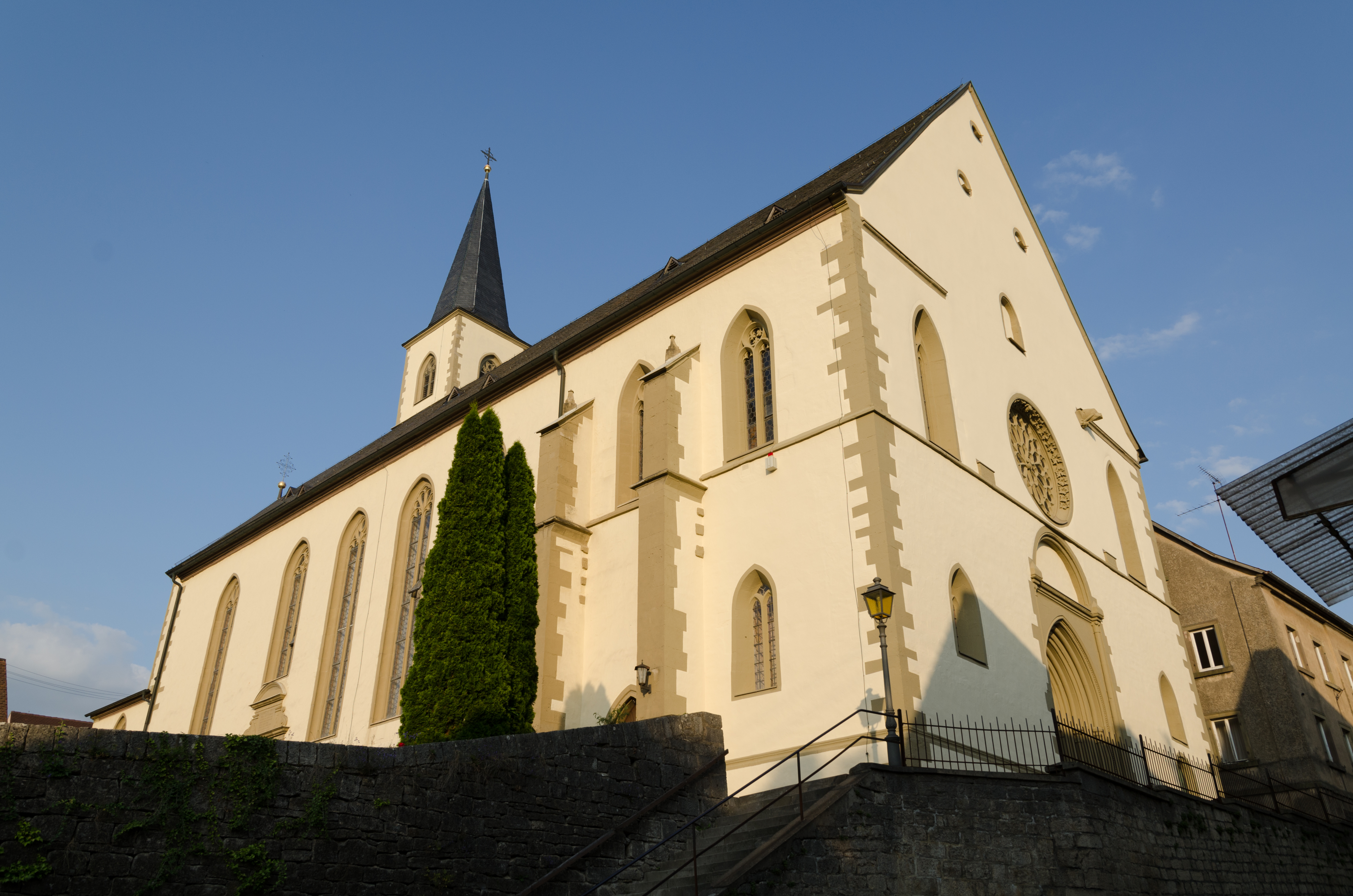 Aub, Kath. Kirche